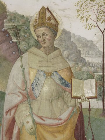 Bonaventura da Bagnoregio, part. affresco, Stroncone, Italy